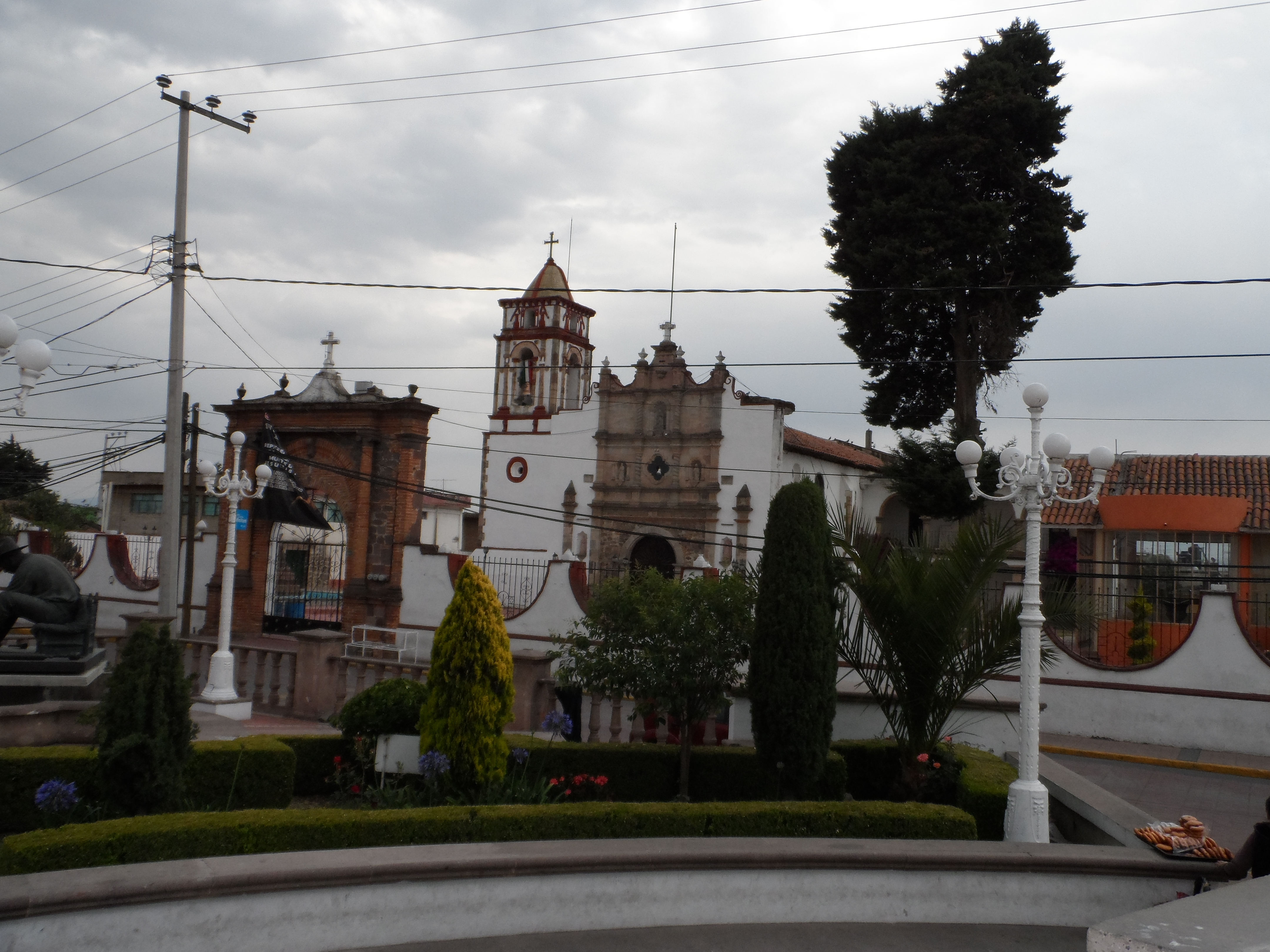 Parroquia de Rayon